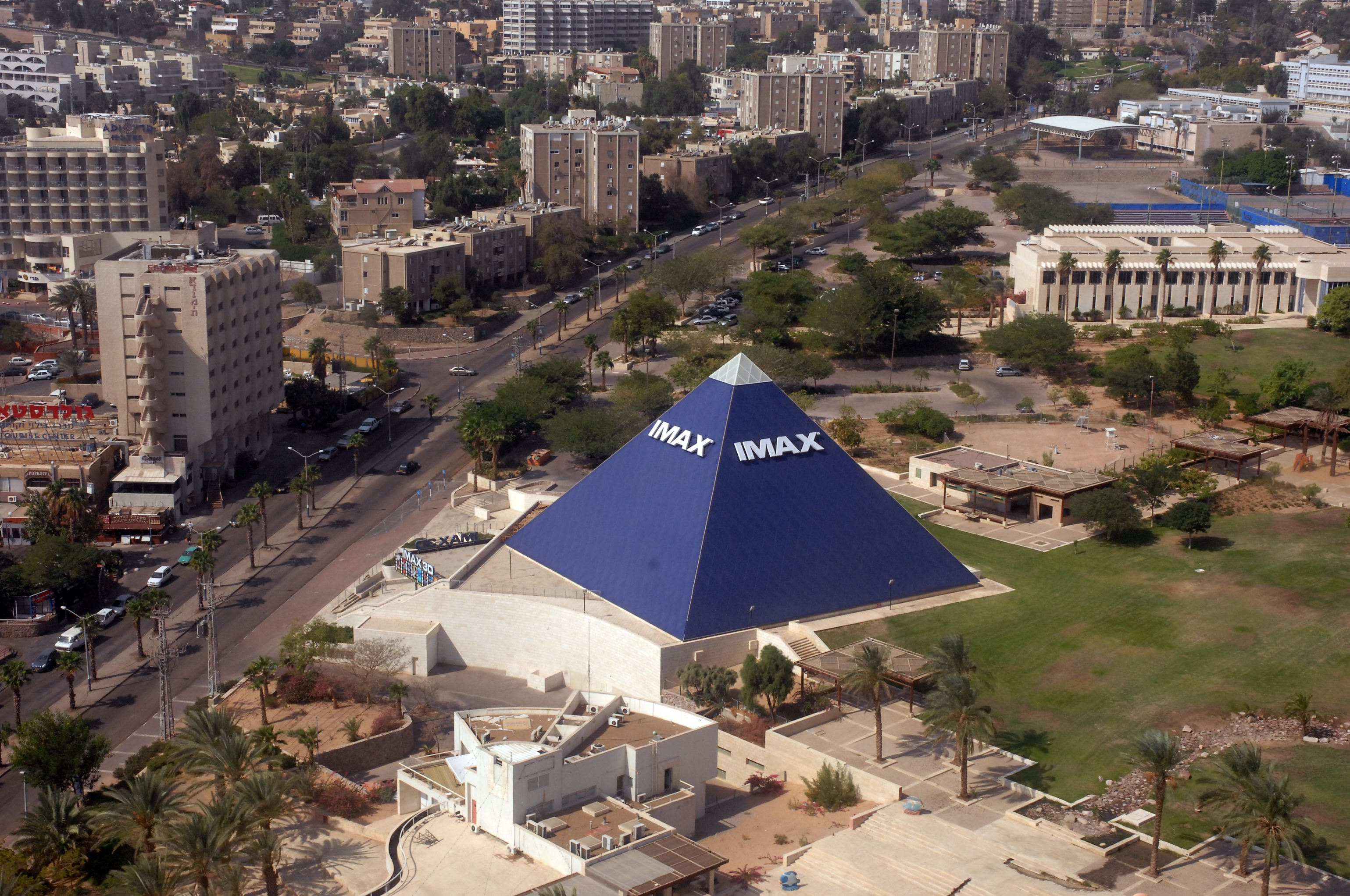 An aerial view of 3-D IMAX cinema in Eilat. צילום אויר של בית הקולנוע (התלת מימדי) איי מקס, באילת.